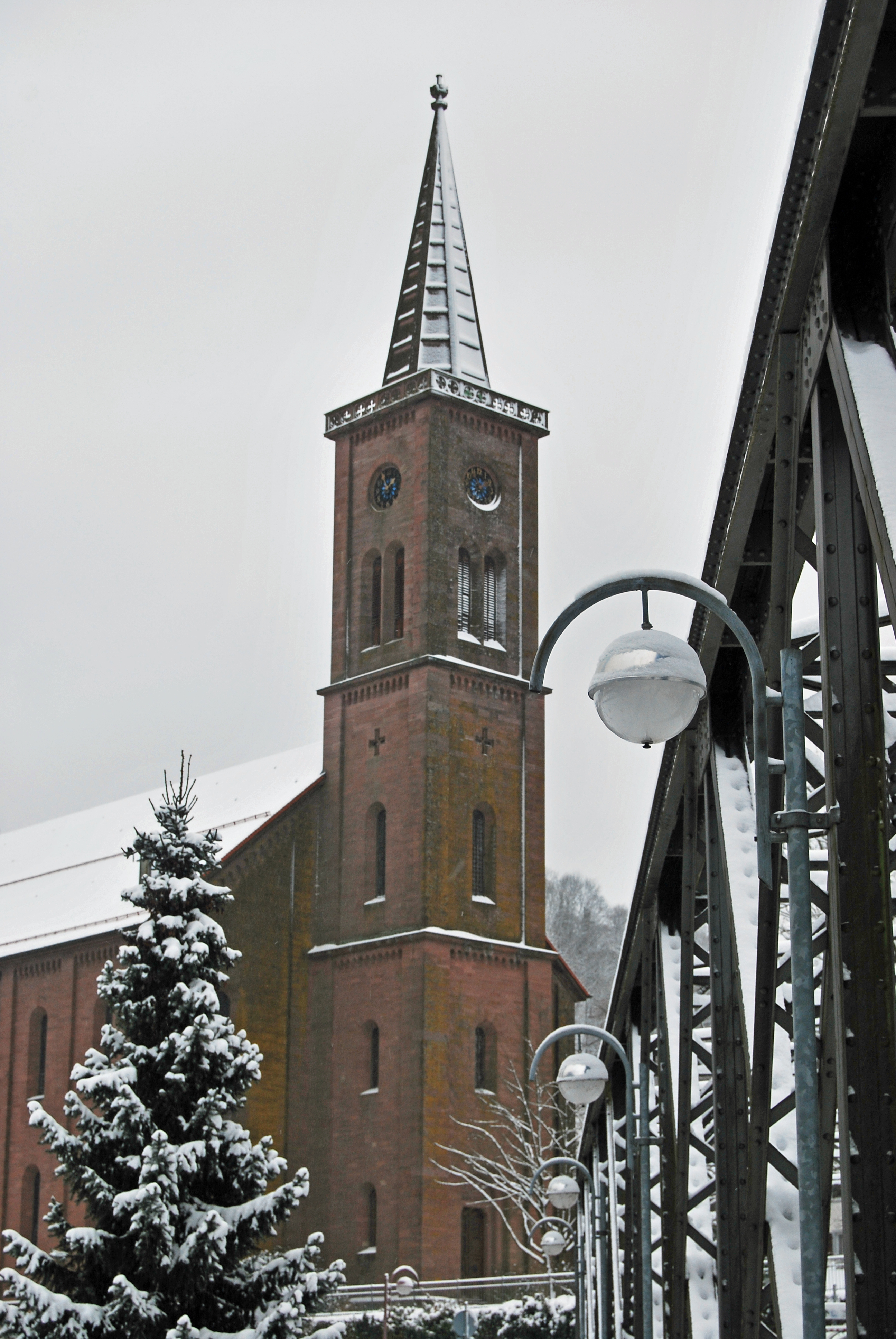 Kirche Schiltach